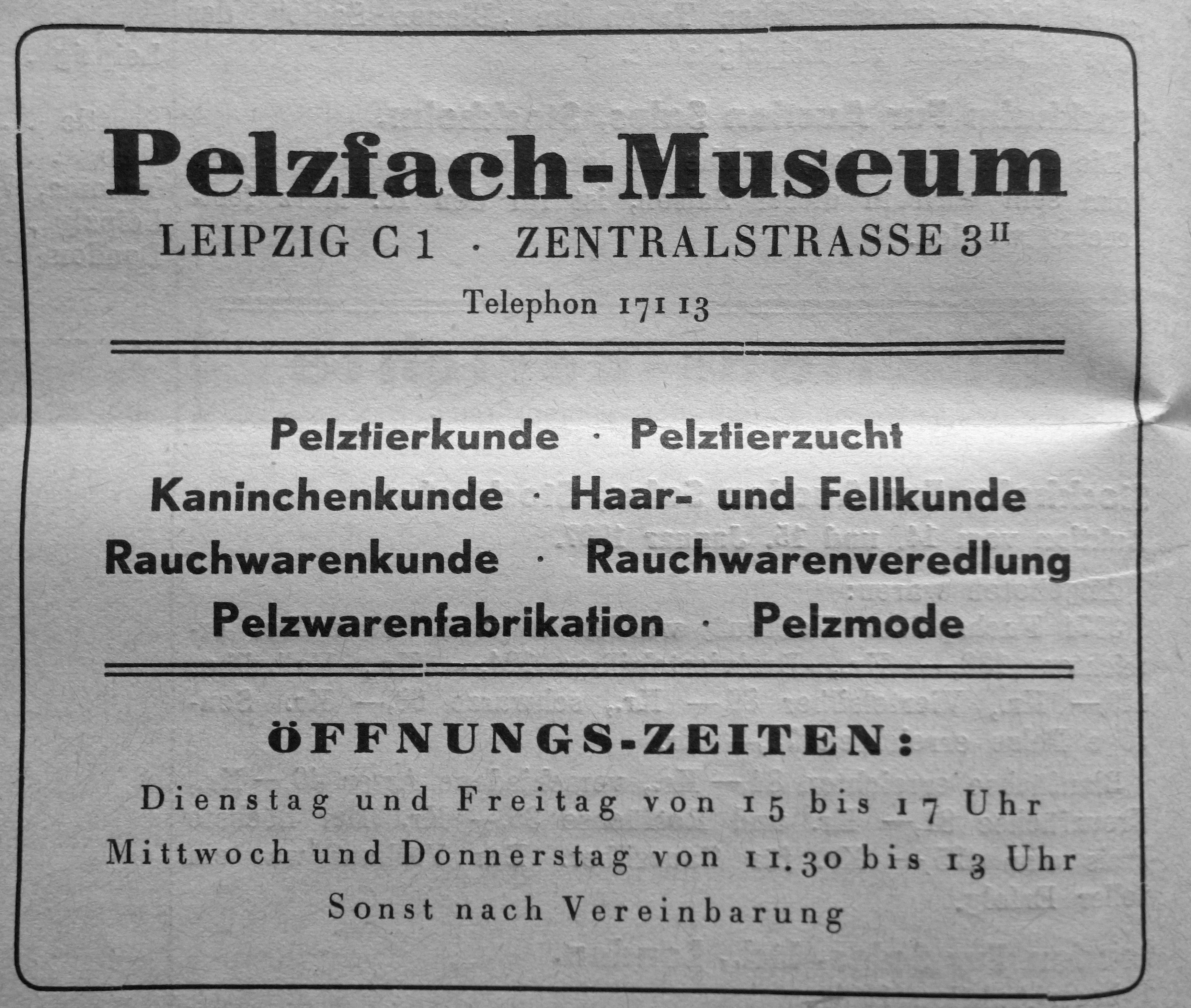 Pelzfach-Museum, Leipzig, Anzeige aus dem Jahr 1937. In: Der Rauchwarenmarkt vom 11. März 1937. Pelzfach-Museum, Leipzig C 1, Zentralstraße 3 II. Pelztierkunde, Pelztierzucht, Kaninchenkunde, Haar- und Fellkunde, Rauchwarenkunde, Rauchwarenveredlung, Pelzwarenfabrikation, Pelzmode. Öffnungs-Zeiten: Dienstag und Freitag von 15 bis 17 Uhr. Mittwoch und Donnerstag von 11.30 bis 13 Uhr. Sonst nach Vereinbarung.